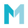 Logotipo de Radio Televisión Melilla.